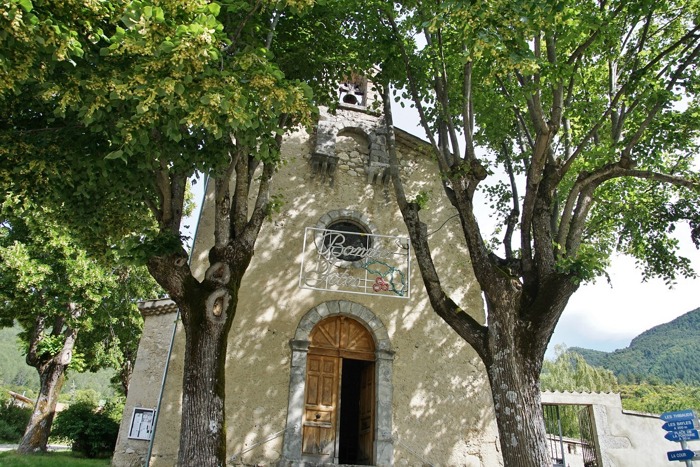 département de la Drôme